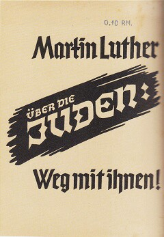 Réédition de 1938 de l'ouvrage Des Juifs et de leurs mensonges de Martin Luther